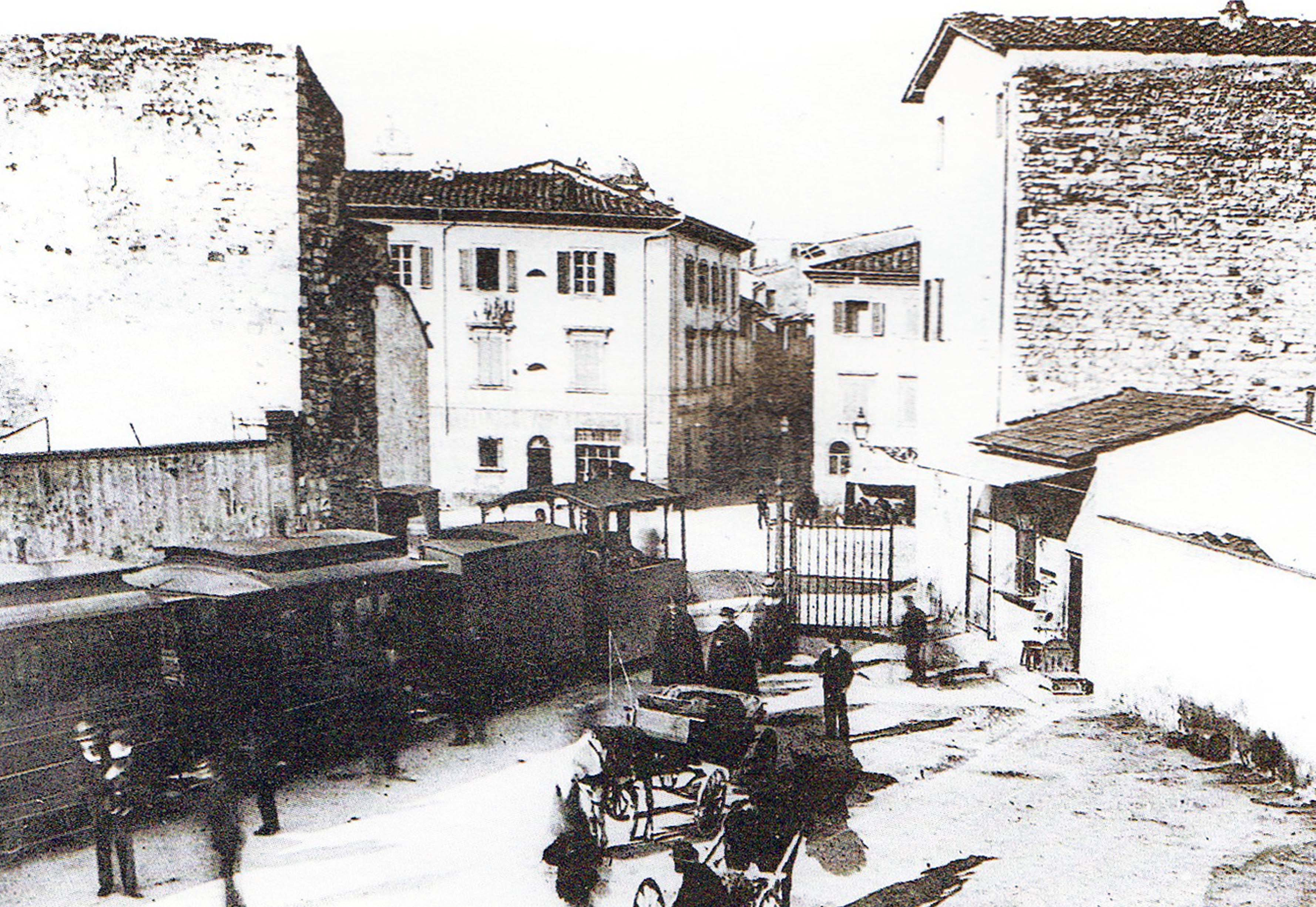 Barriera daziaria di Porta fiorentina a Prato con un convoglio tranviario in transito